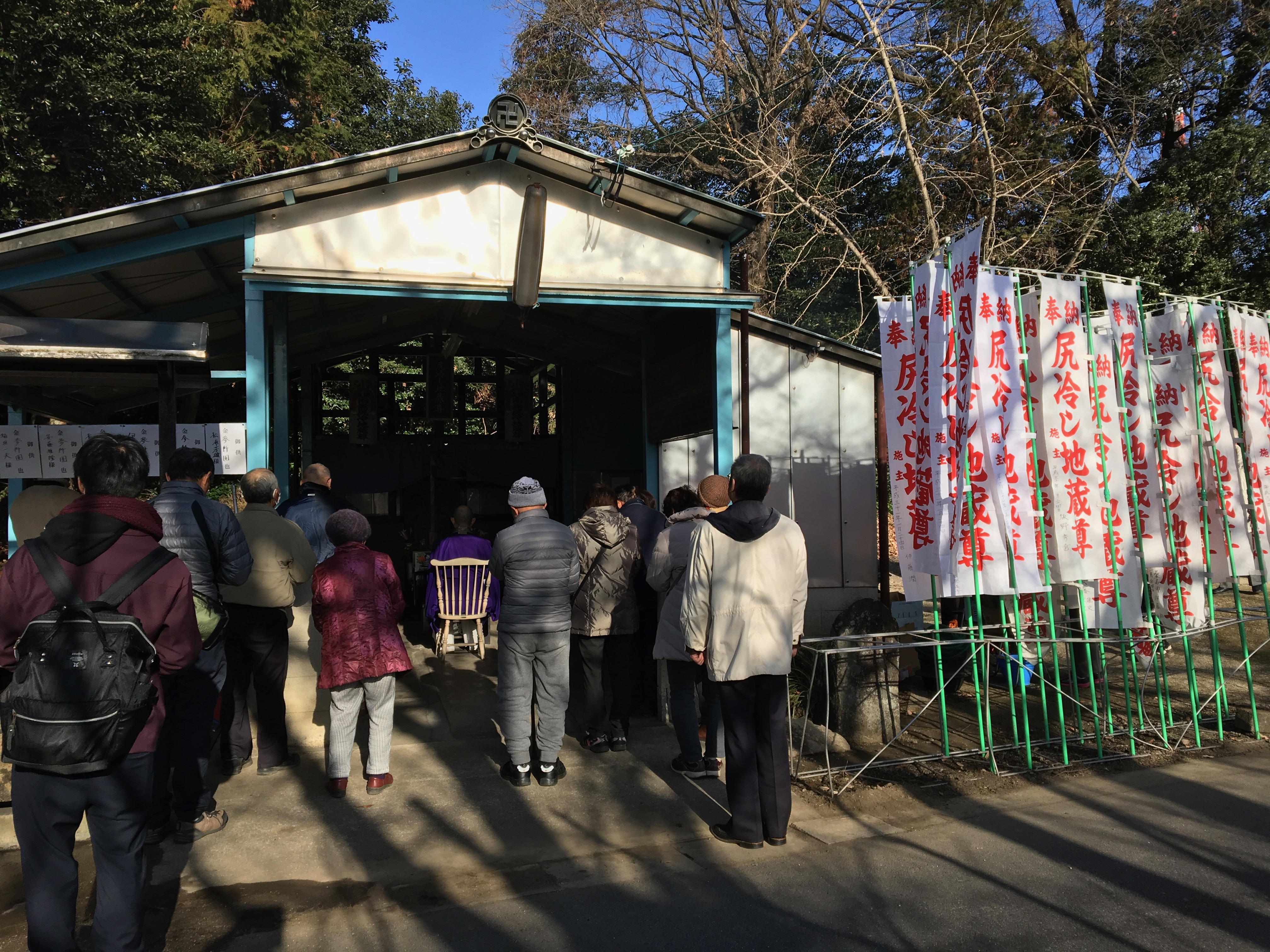 毎年1月24日に行われる初地蔵の法要の模様